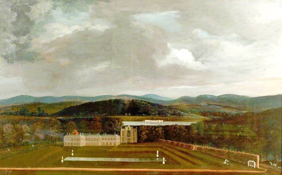 Ostansicht von Newstead Abbey